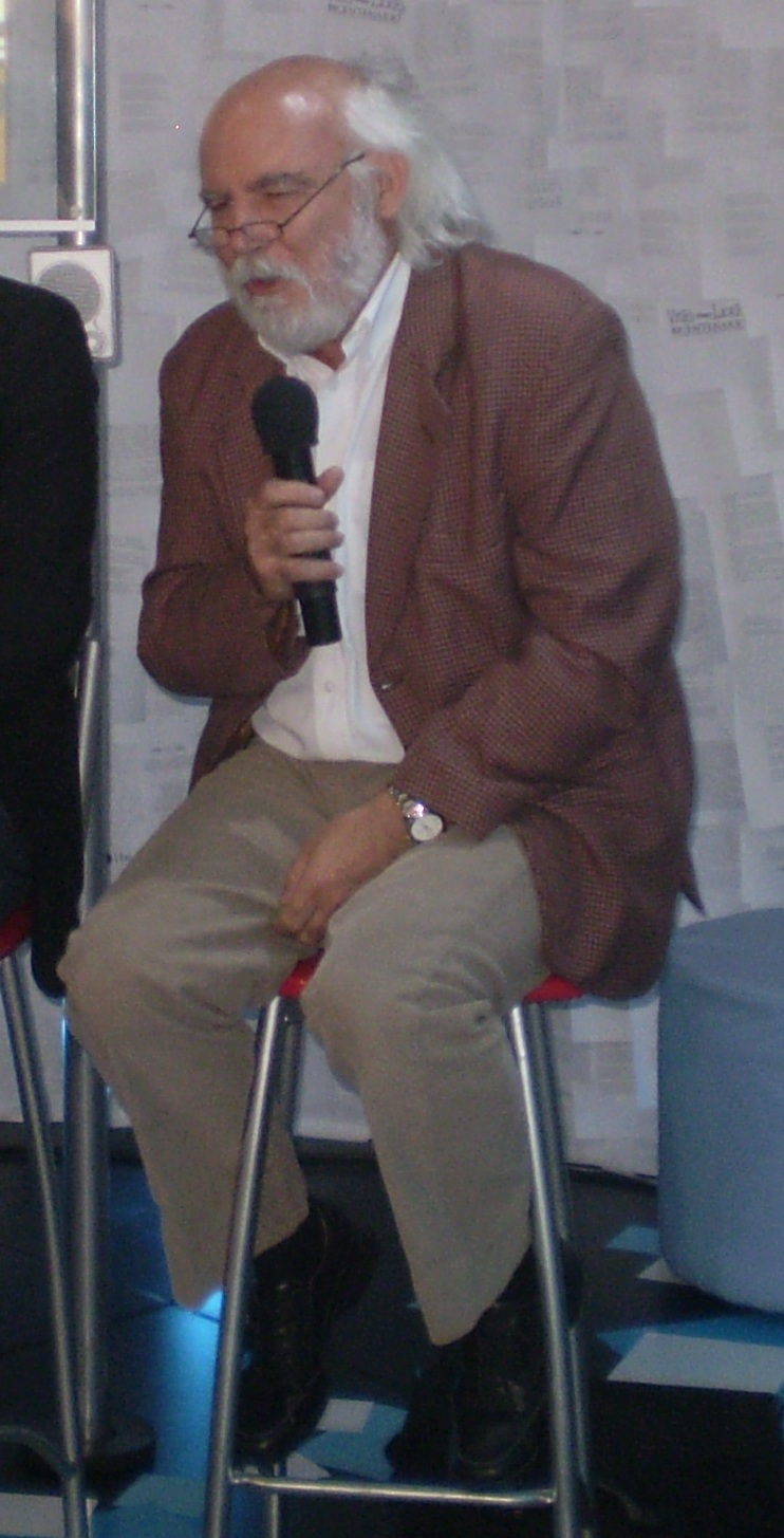 Juan Sasturain en la Feria del Libro